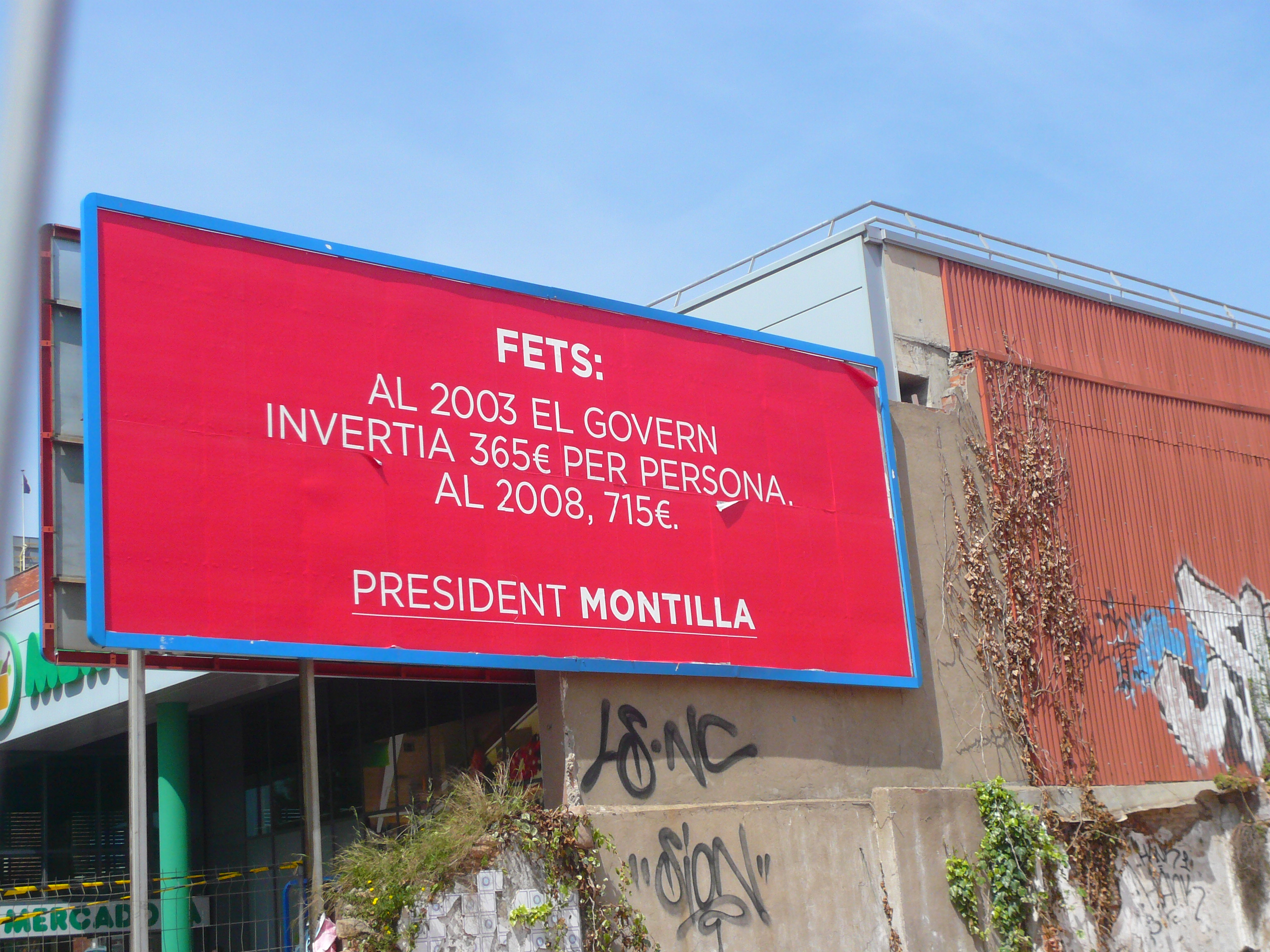 Publicitat del PSC a Esplugues de Llobregat l'abril de 2009.